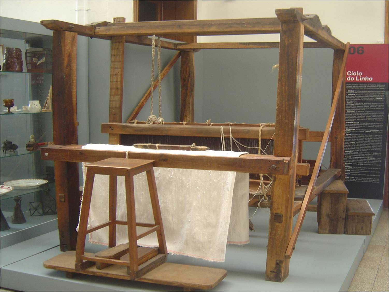 O tear pode ser horizontal ou tear de grade; para tecer, deve-se encher a canela (tubo de linhas) e, com a lançadeira, fazer a trama na urdidura.